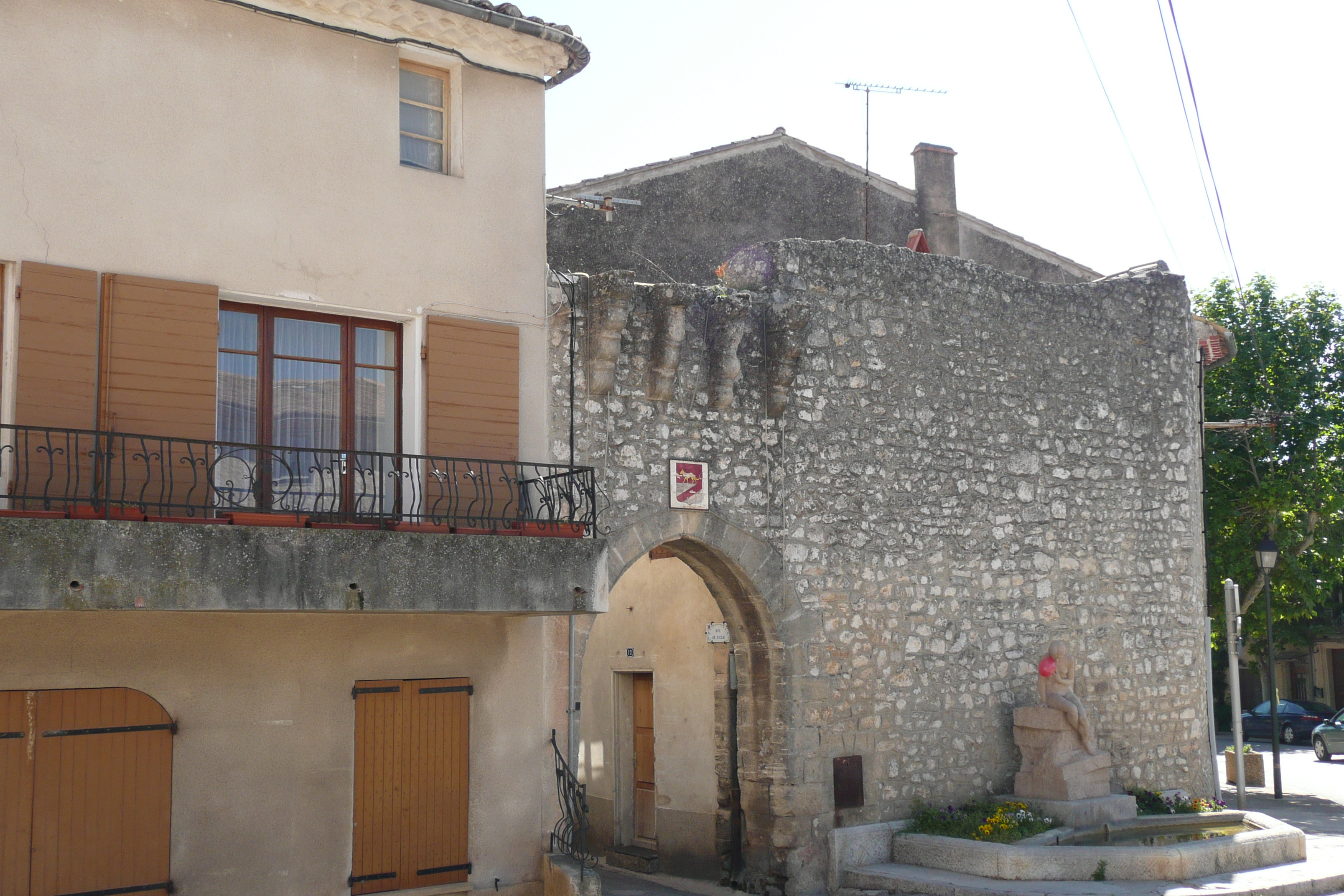 La Bastide-des-Jourdans.